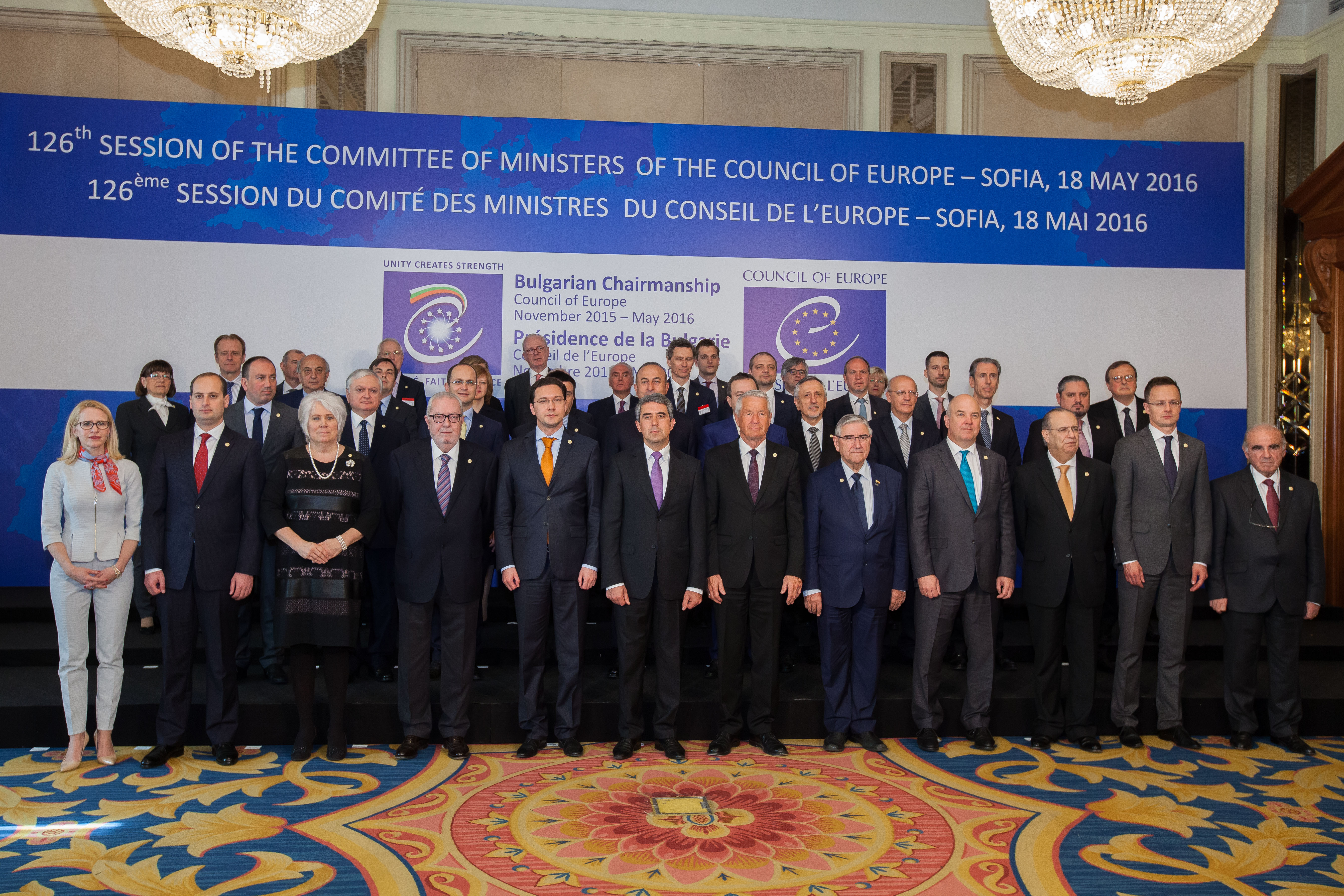 Τοποθέτηση ΥΦΥΠΕΞ, Γ. Αμανατίδη, στην 126η Σύνοδο της Επιτροπής Υπουργών του Συμβουλίου της Ευρώπης (Σόφια)